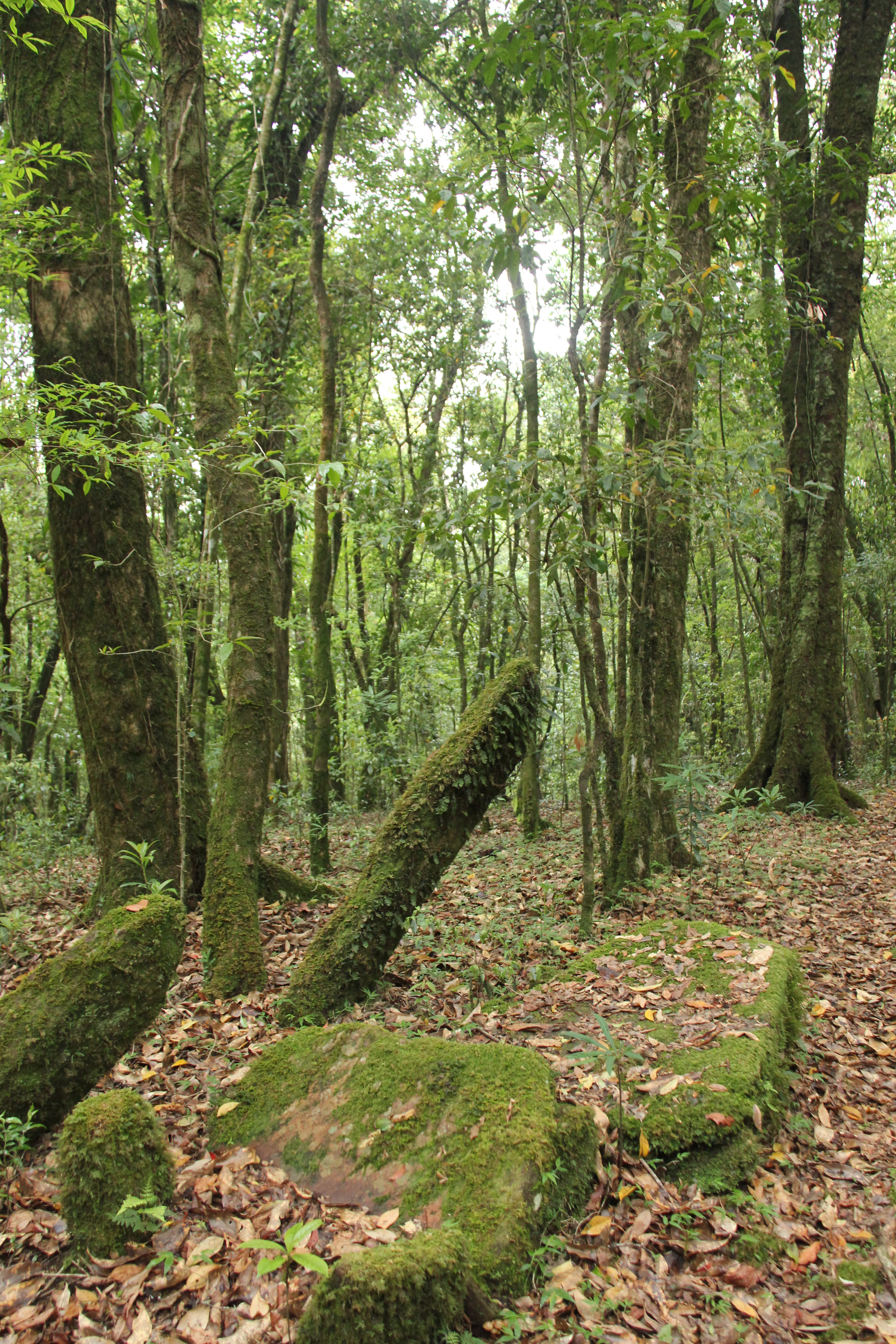 East Khasi Hills, Meghalaya